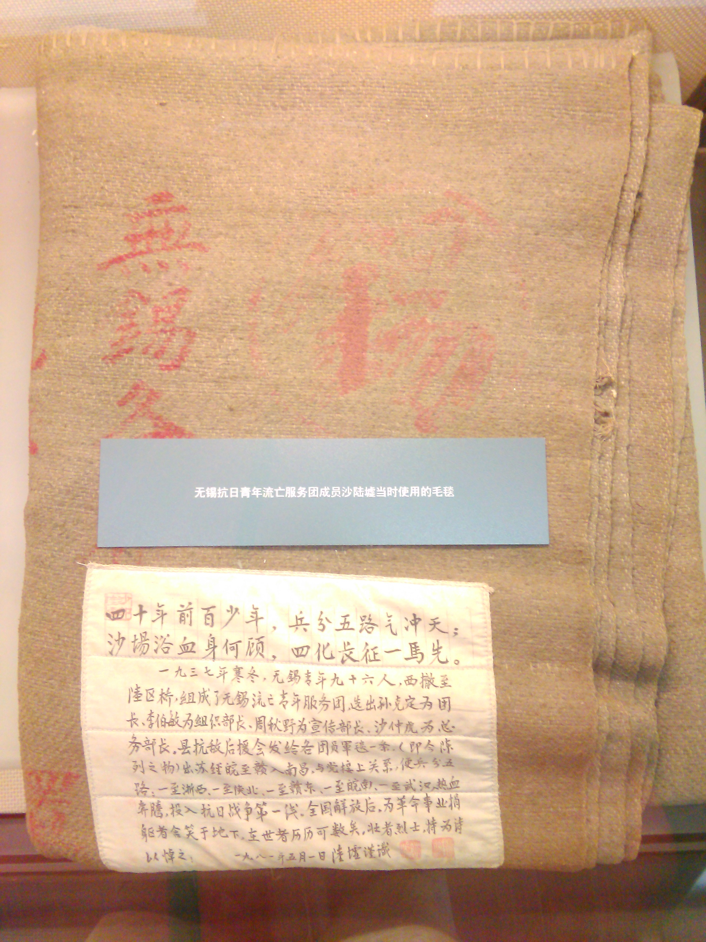 中文（中国大陆）: 抗日毛毯，无锡